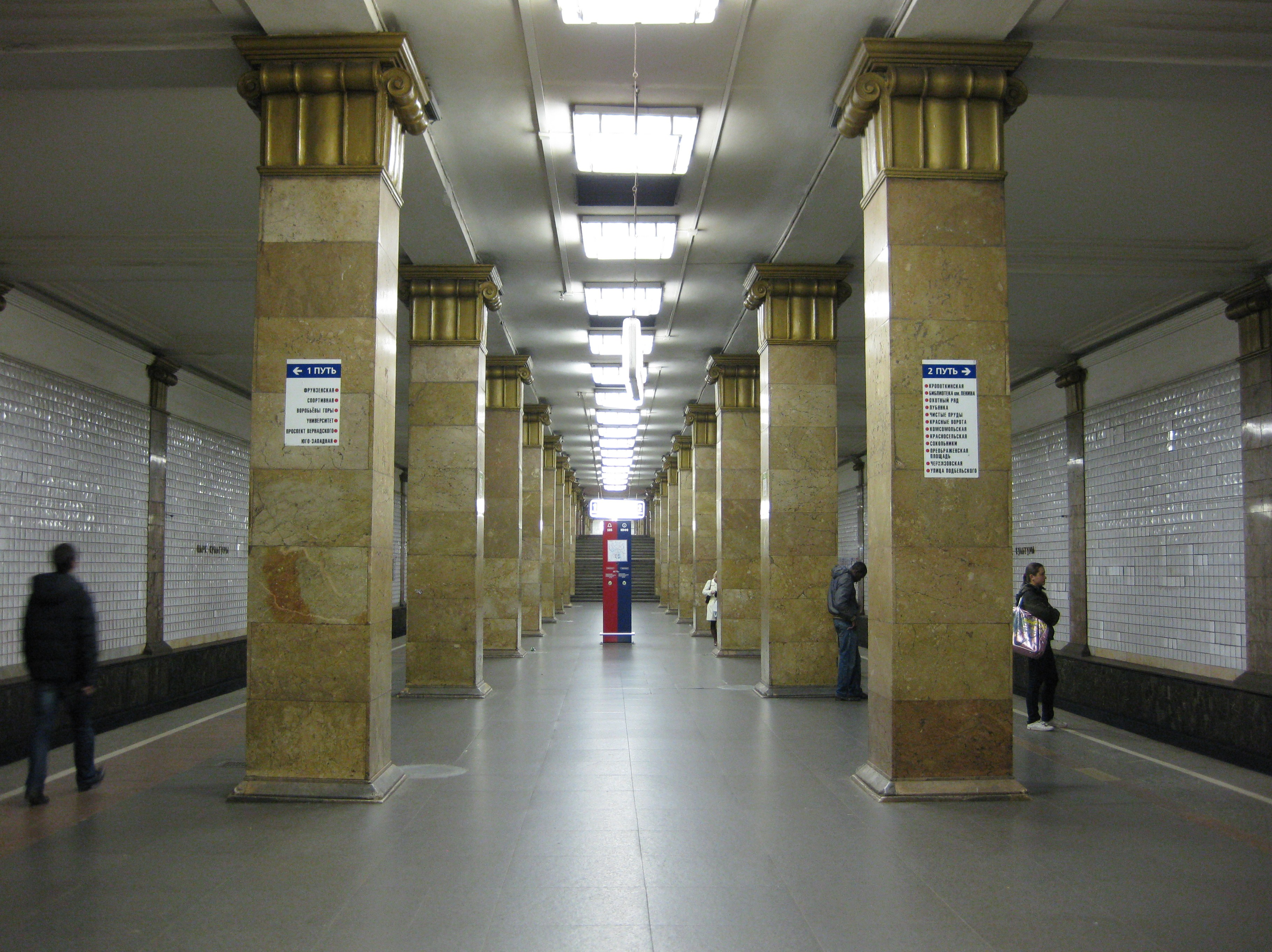 Вестибюль станции «Парк культуры» Московского метрополитена